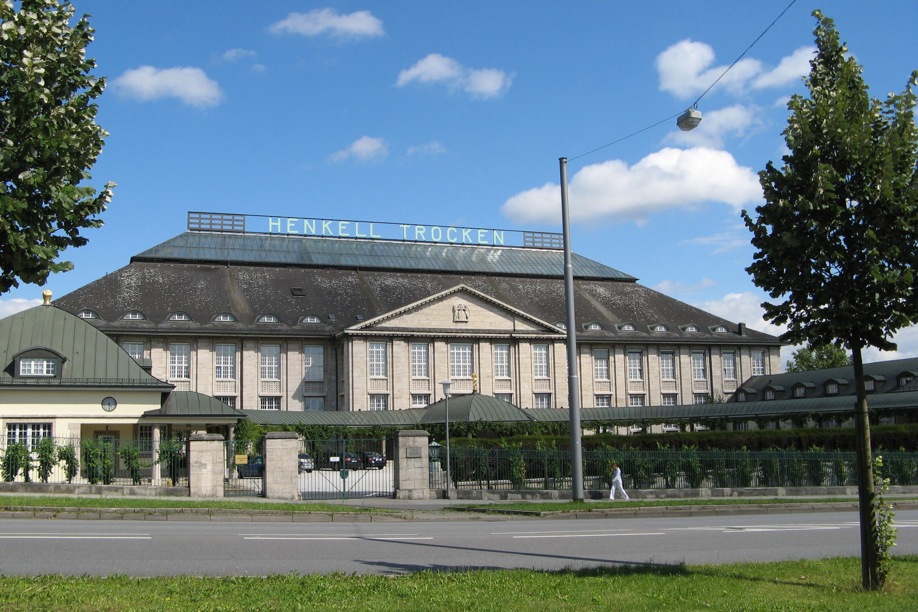 Das „Henkell-Schloss“ ist der Sitz der Firma Henkell & Söhnlein Sektkellereien KG in Wiesbaden